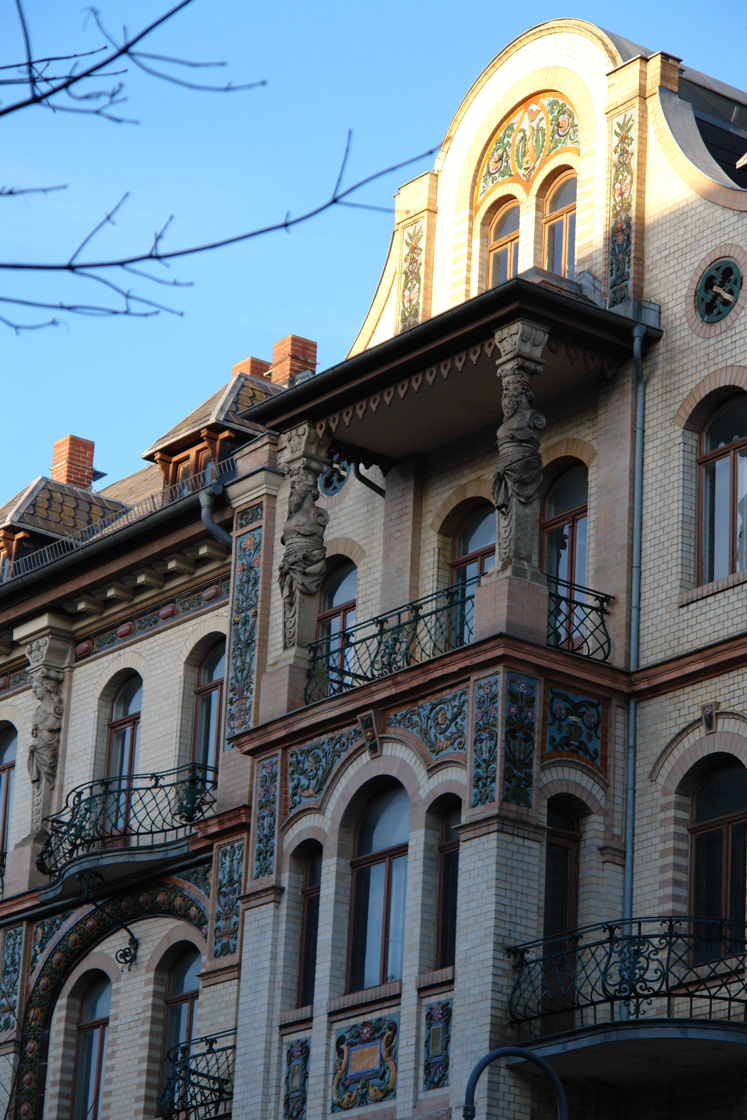 Chemnitz-Kaßberg, Barbarossastraße